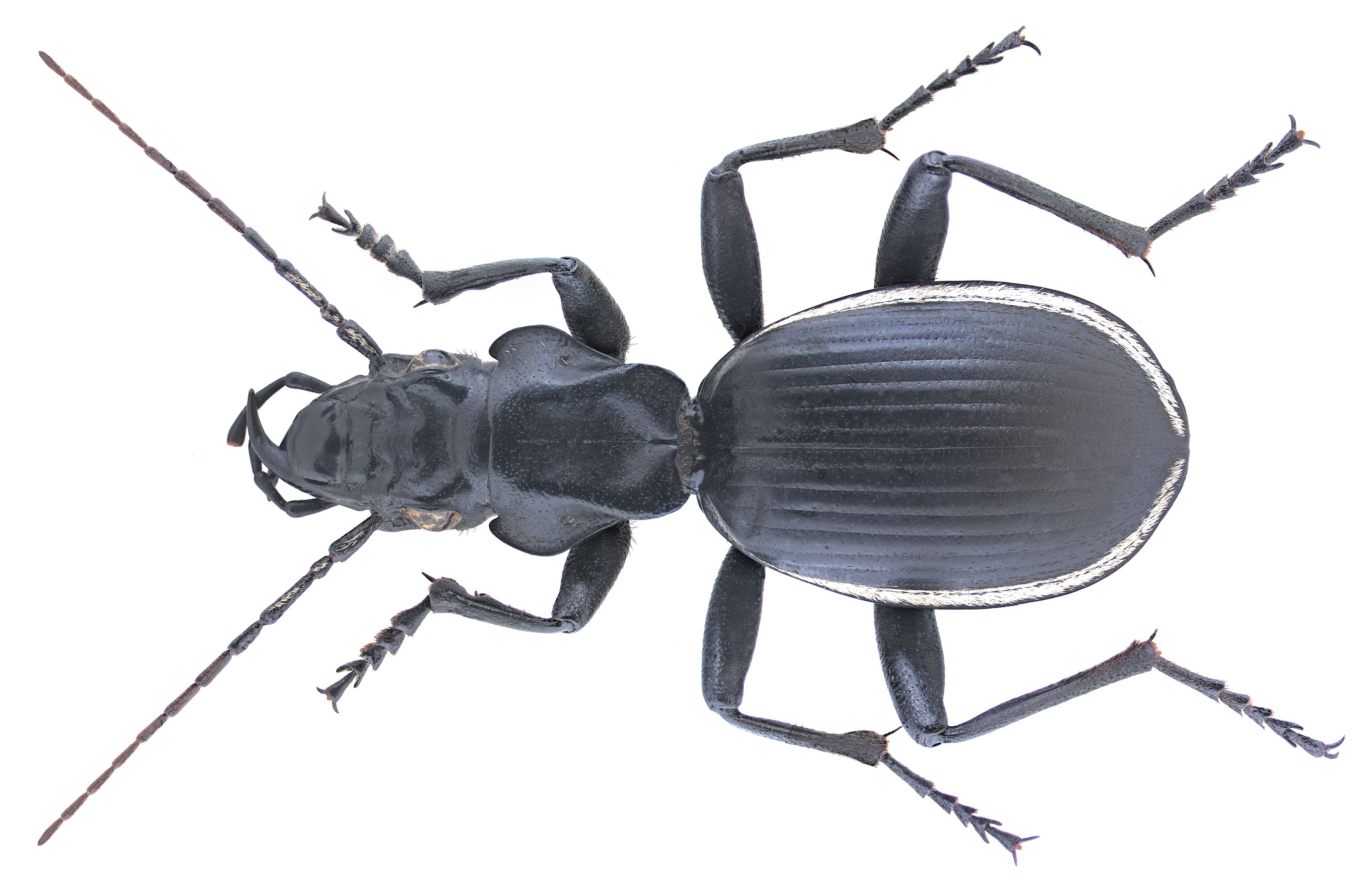 Familie: Carabidae Grösse: 37-42 mm Fundort: Namibia, Etosha National Parc leg. U.Schmidt, 1994; det. W.Lorenz Foto: U.Schmidt, 2007